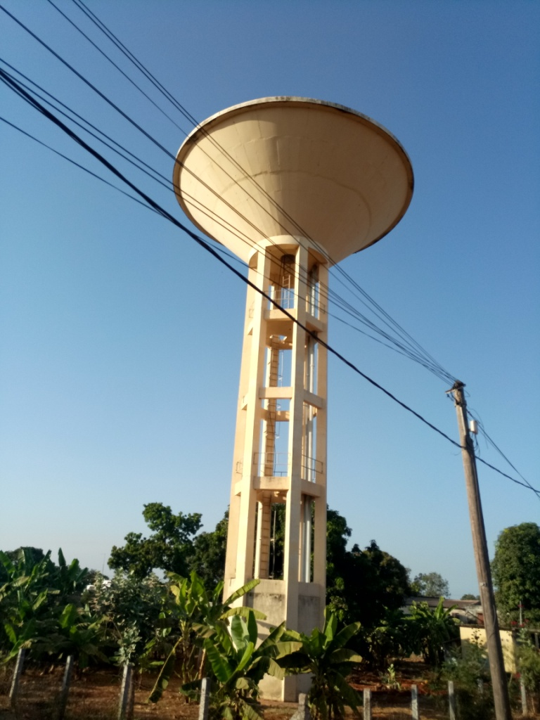 Le Forage de Goudomp est une infrastructure communautaire de base qui permet une alimentation correcte des populations de Goudomp en eau potable.